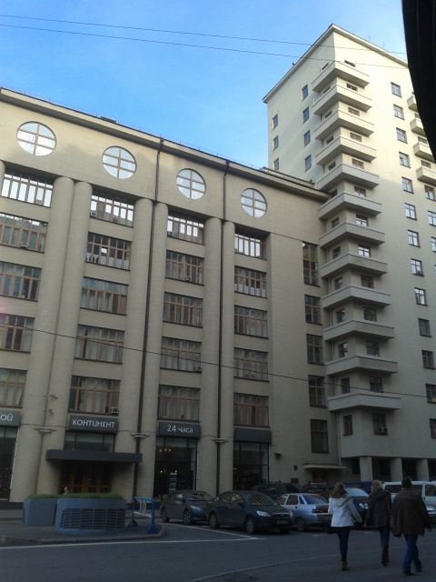 Дом общества Динамо на Большой Лубянке в Москве.